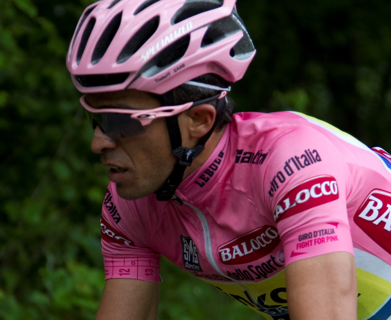 100 contador